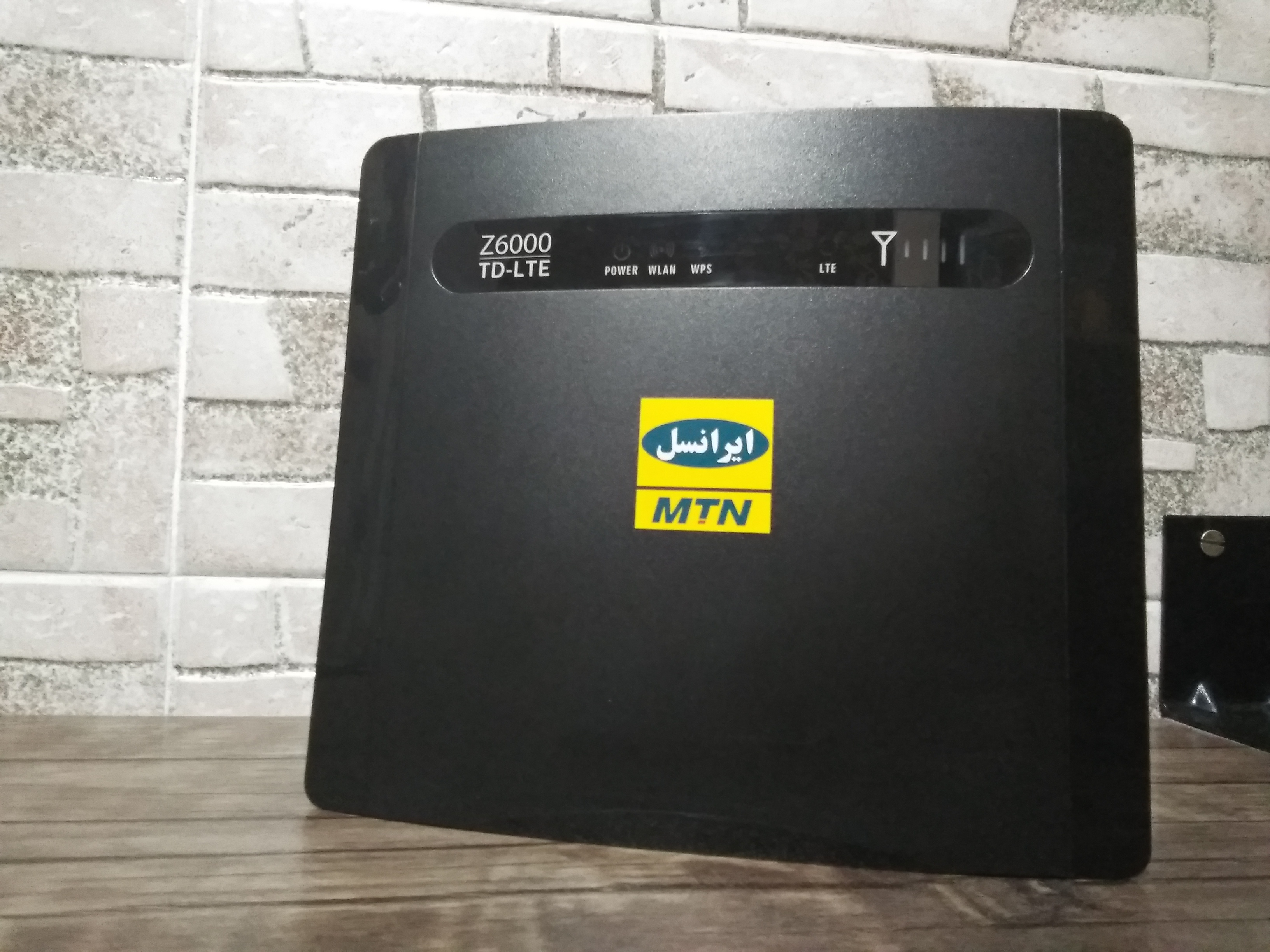 تصویر یک مودم روتر Z6000 شرکت ایرانسل